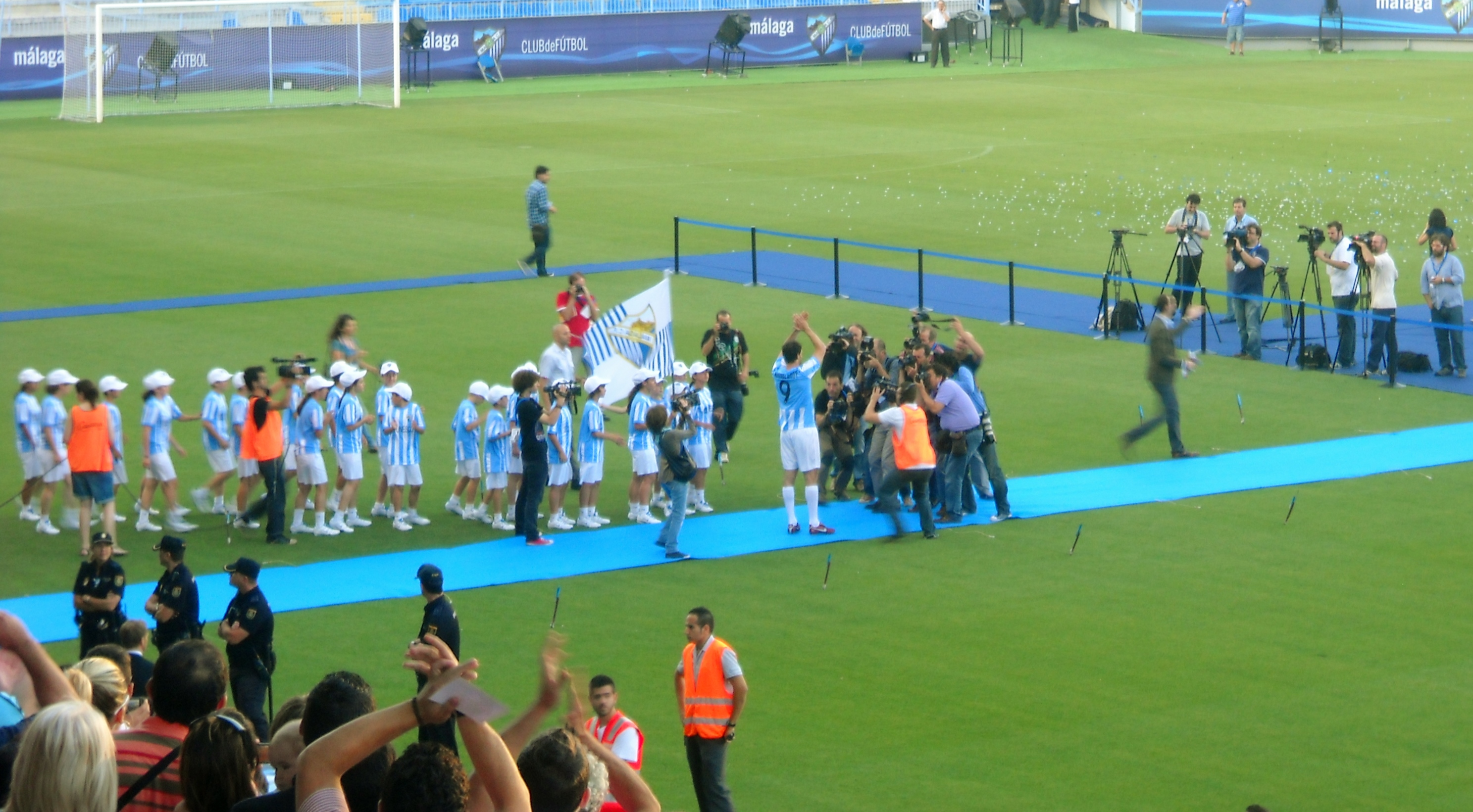 Presentación de Ruud van Nistelrooy como jugador del Málaga Club de Fútbol en el Estadio La Rosaleda.